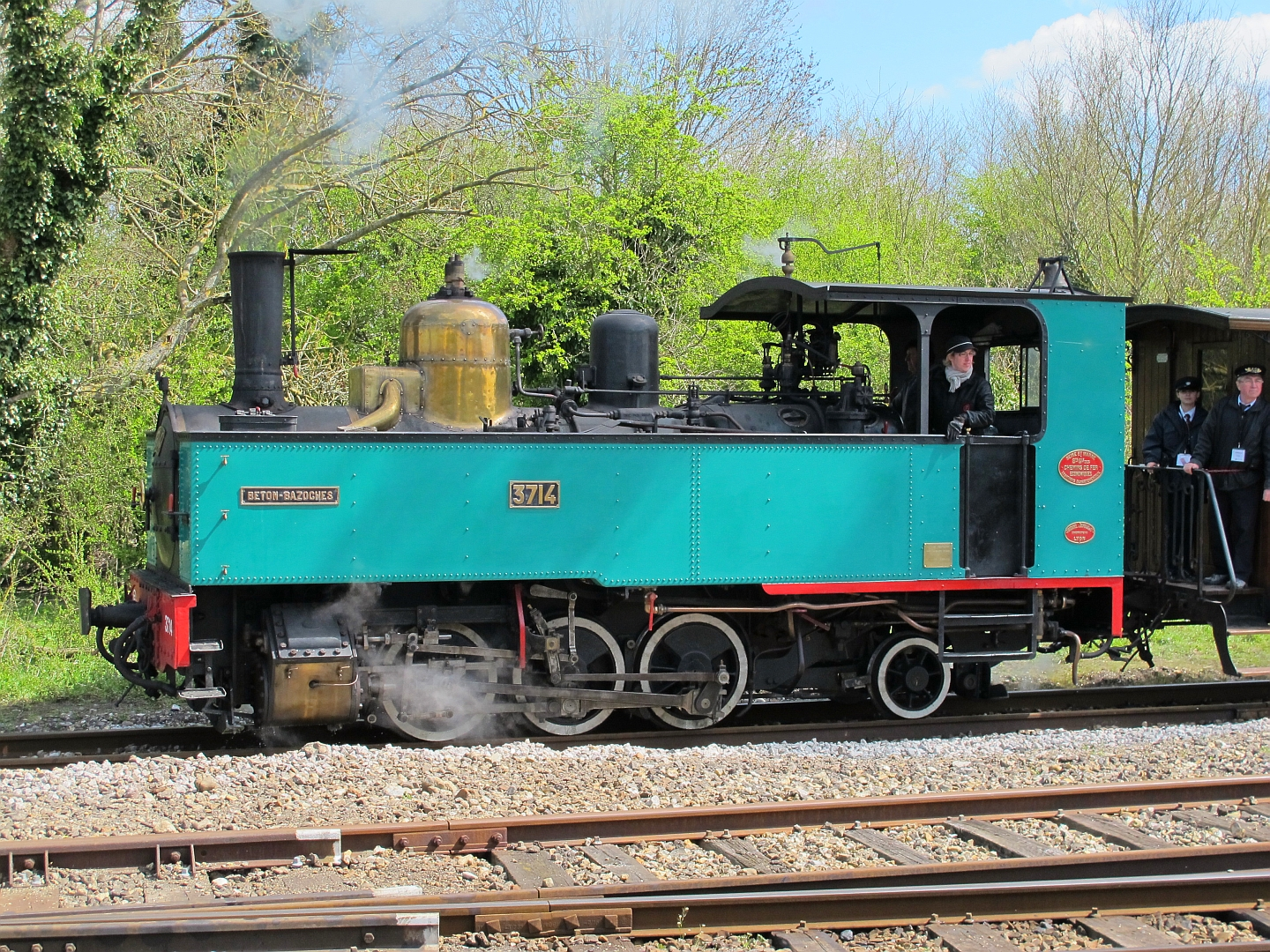 La 031 T Buffaud & Robatel n°3714 du chemin de fer départemental de Seine et Marne, sur le chemin de fer de la baie de Somme le 28 avril 2013.